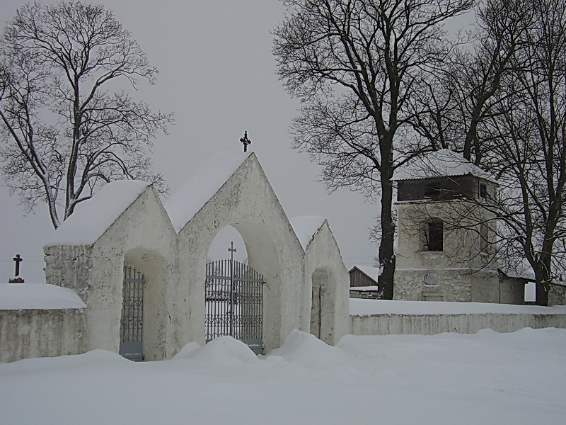 Нача. Касцёл. Брама і званіца